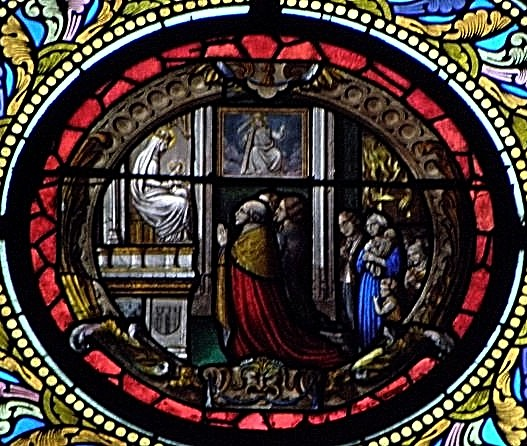 Louis-Guy Guérapin-de-Vauréal, évêque de Rennes, implorant la Vierge pendant le grand incendie de 1732. Rondel de la basilique Notre-Dame-de-Bonne-Nouvelle de Rennes (35).